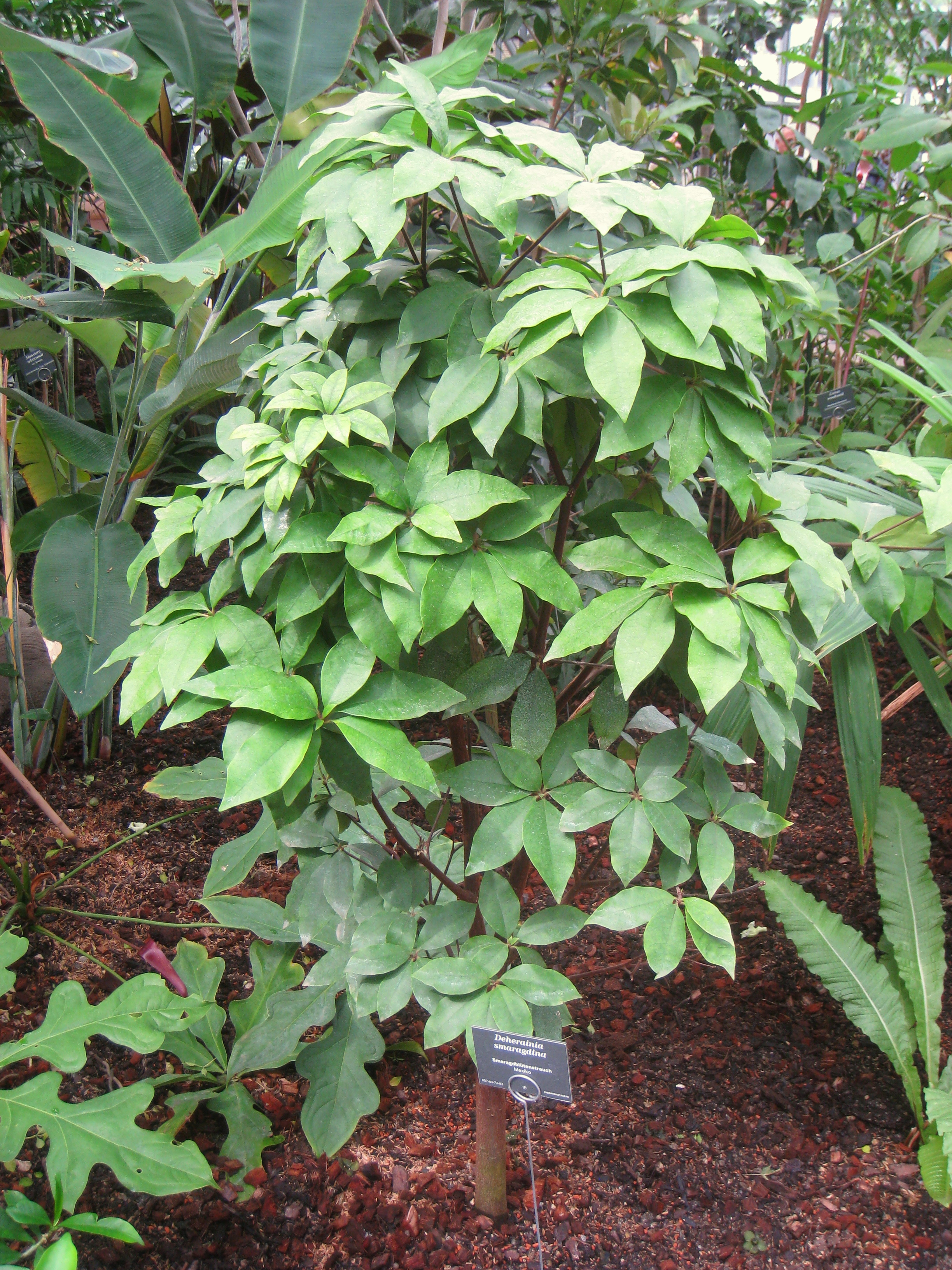 Deherainia smaragdina specimen in the Botanischer Garten, Berlin-Dahlem (Berlin Botanical Garden), Berlin, Germany.